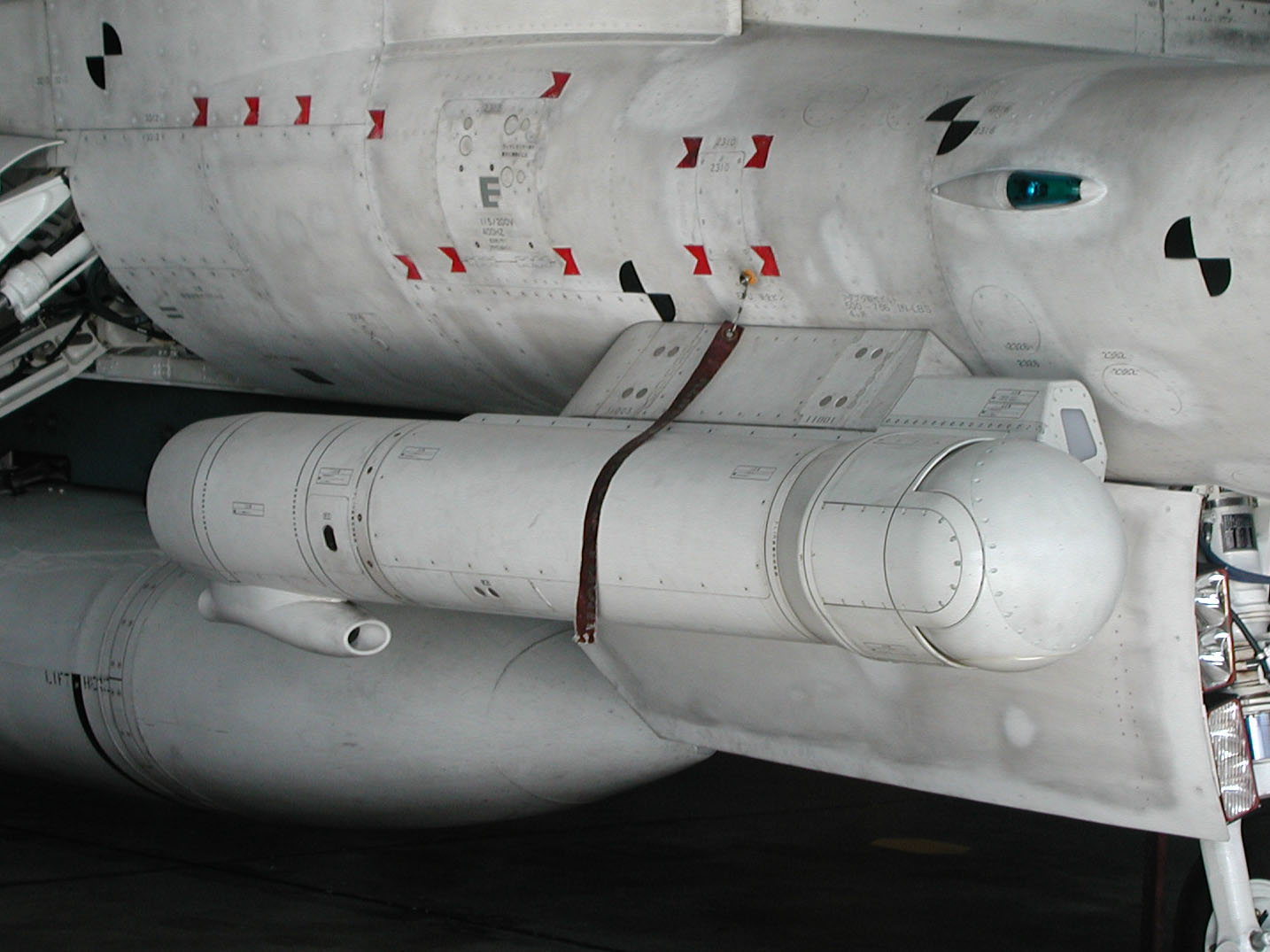 F-2支援戦闘機用の外装型赤外線前方監視装置、航空自衛隊岐阜基地にて撮影。